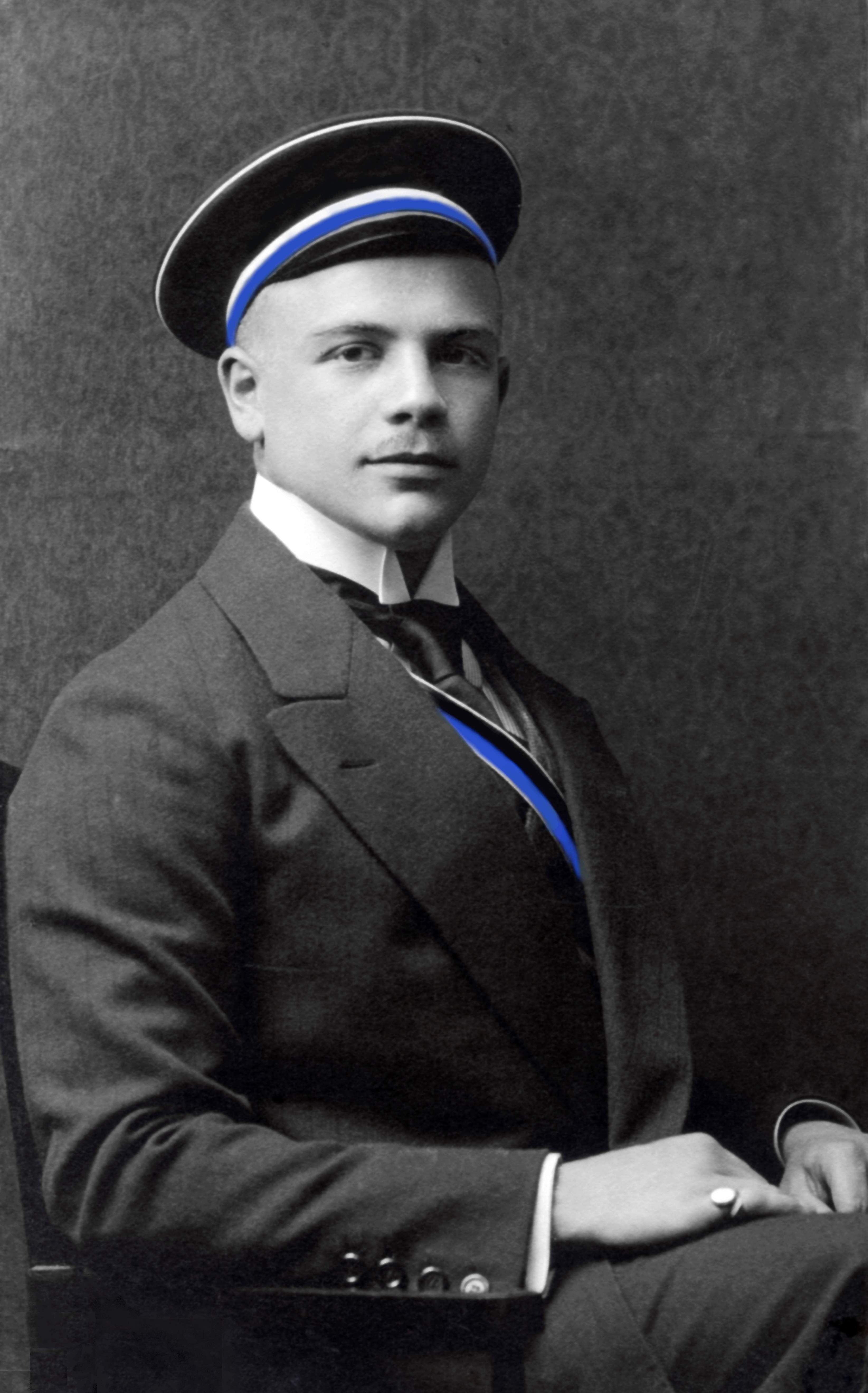 Otto Scheib als Corpsbursche der Suevia München